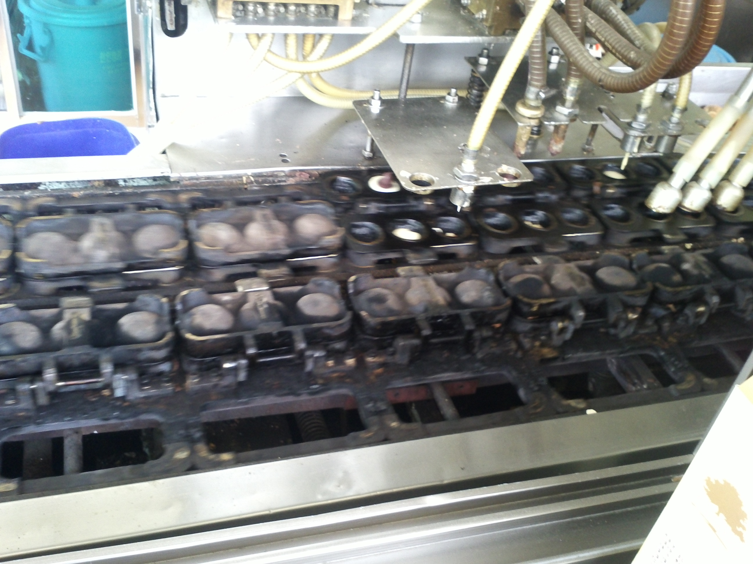 호두굽는 기계